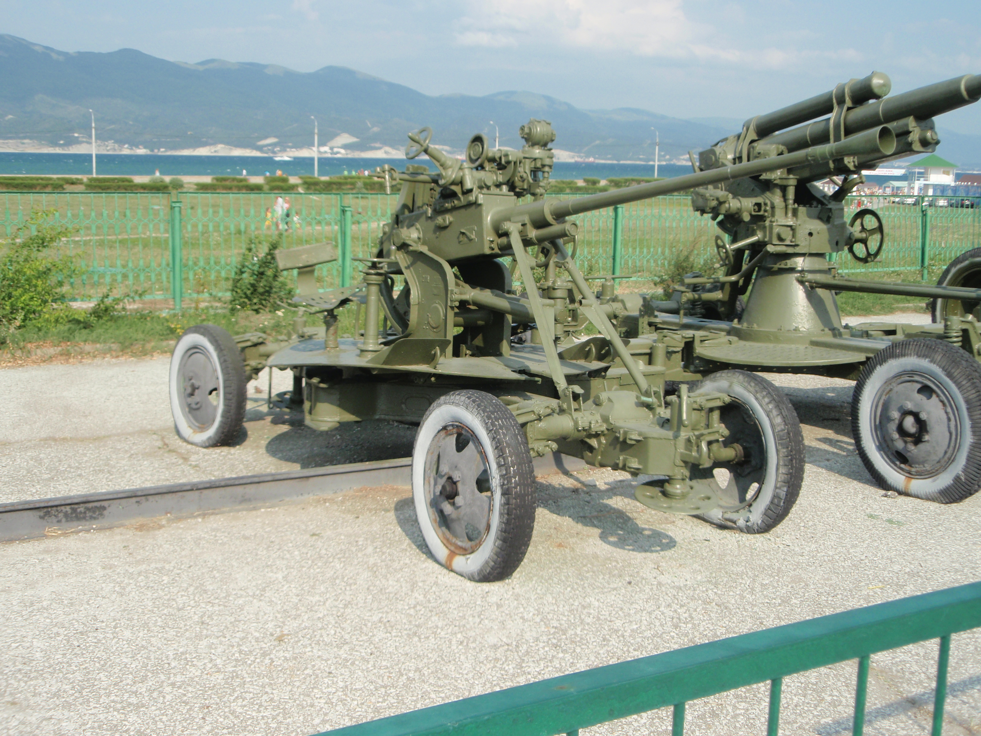 Советская 37-мм зенитная пушка 61-К в музее-заповеднике «Малая Земля» (г.Новороссийск)